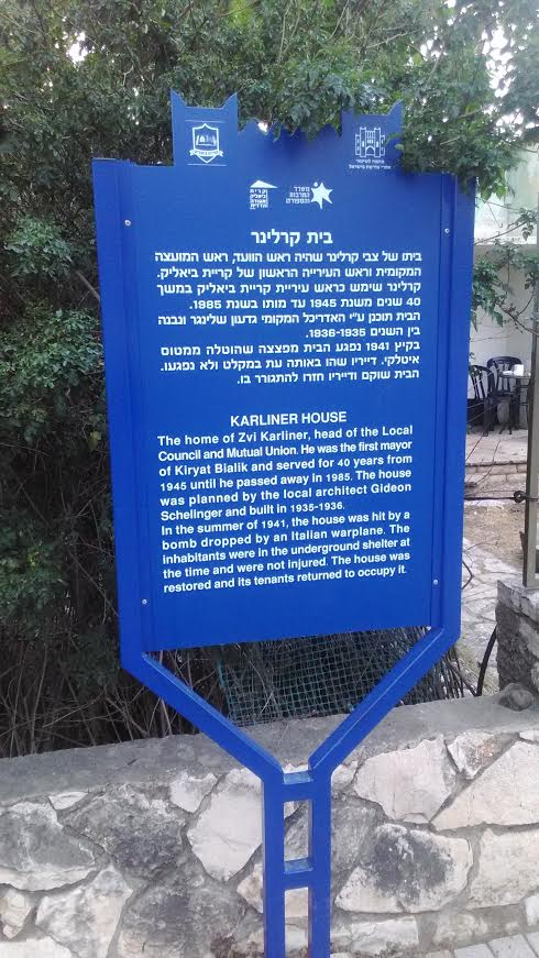 שלט הנצחה ליד הבית בו התגורר קרלינר